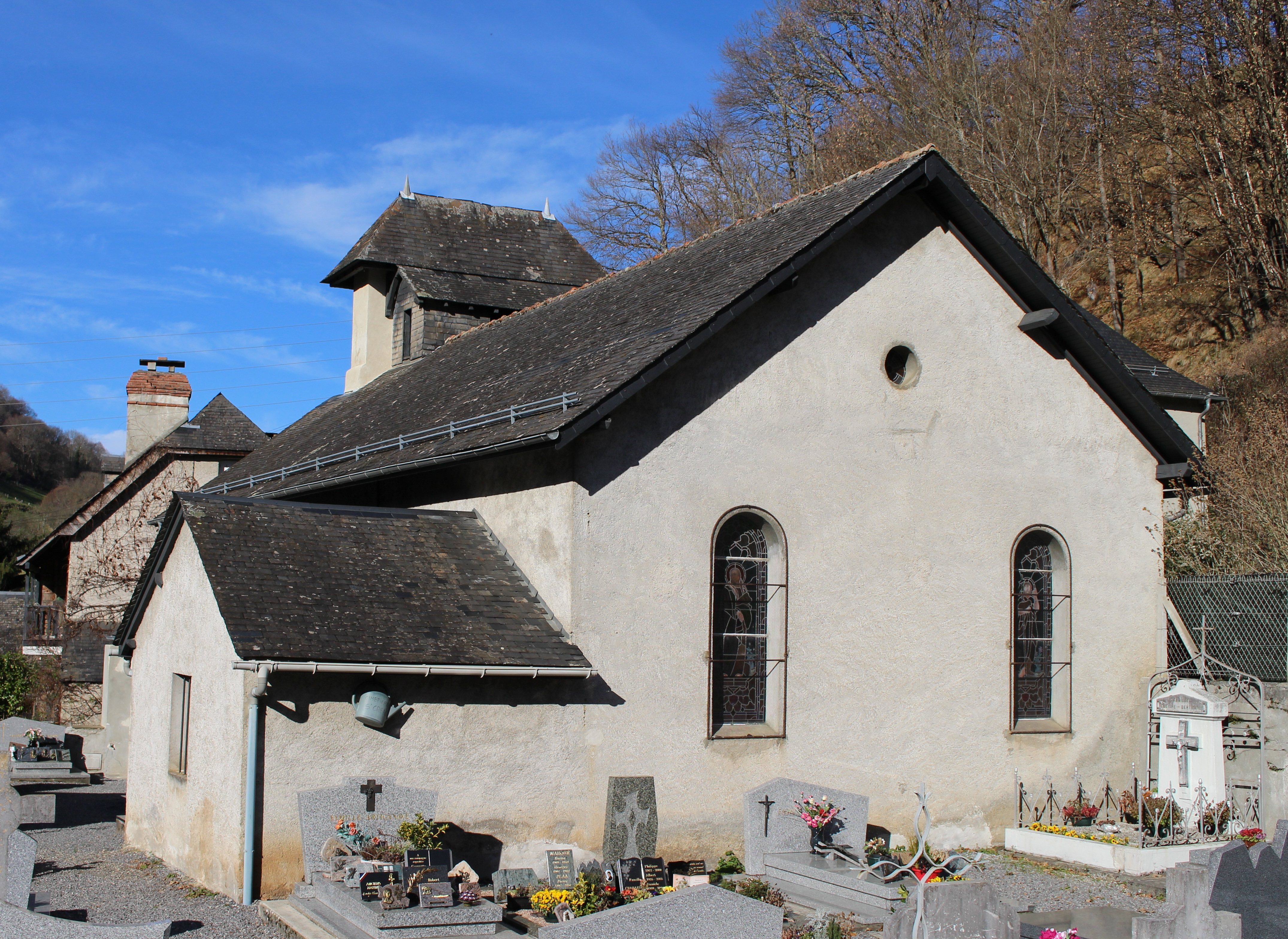 Église Saint-Cyriaque de Saint-Créac (Hautes-Pyrénées)